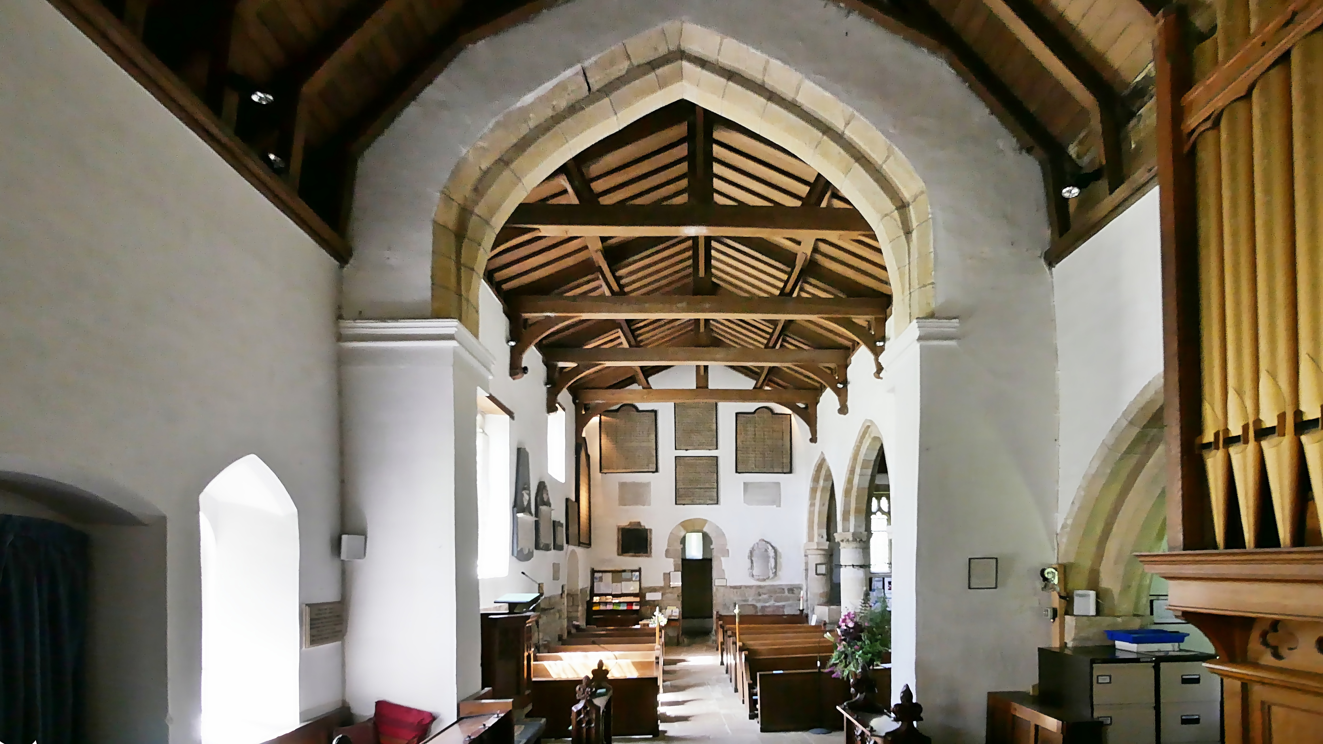 St Gregory's Minster, Kirkdale - a from the chancel to the nave